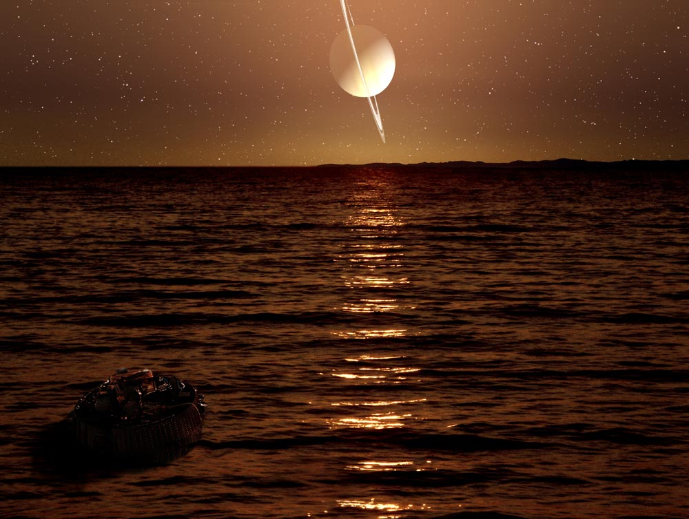 Künstlerische Vorstellung der Oberfläche des Saturnmondes Titan. Die Raumsonde der ESA Huygens wird im Januar 2005 auf ihm landen. Es ist aufgrund seiner dichten Atmosphäre nicht klar, ob Titan eine feste oder flüssige Oberfläche besitzt.